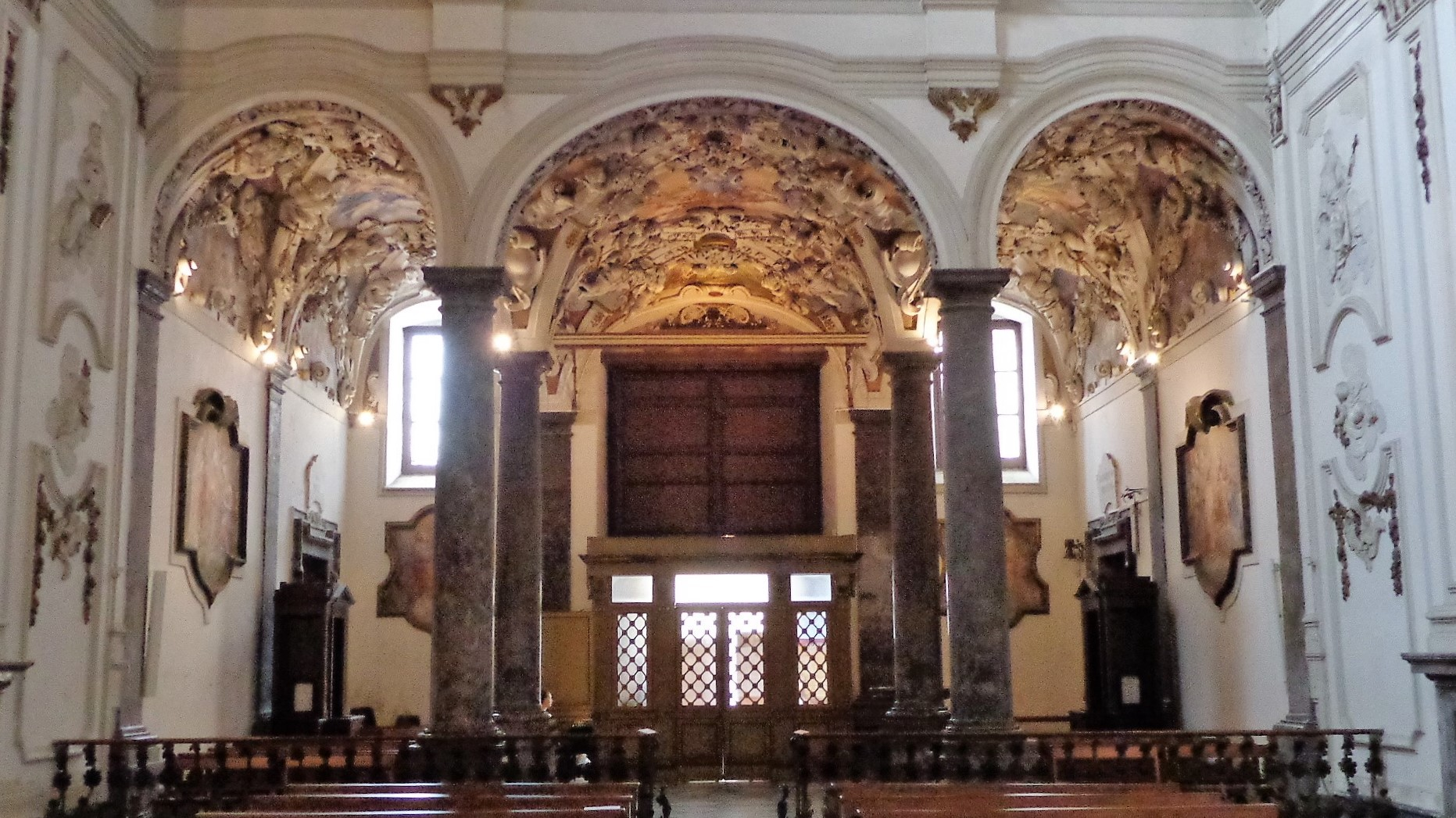 Coro.